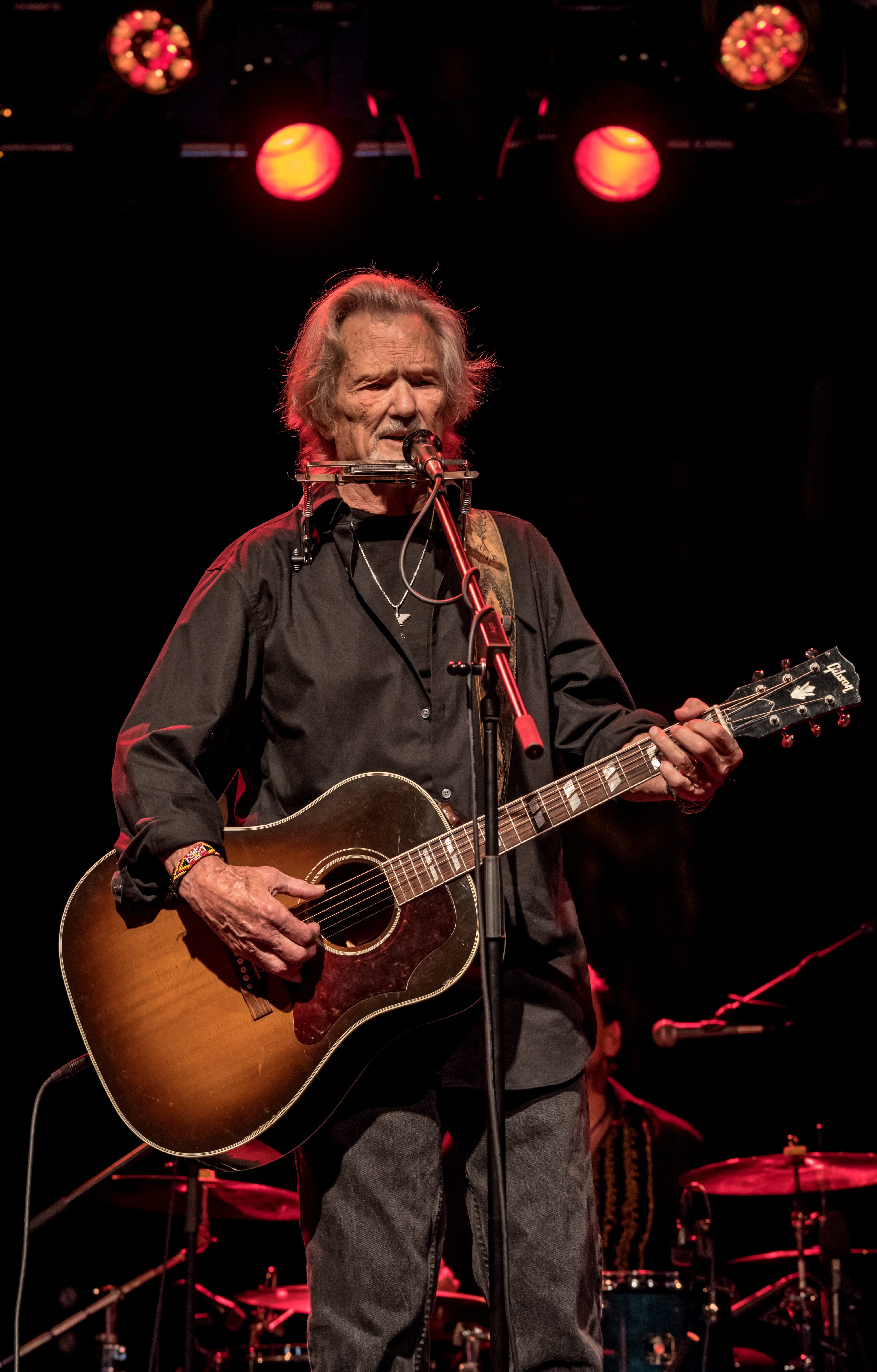 Bilder vom Zelt Musik Festival 2017 in Freiburg im Breisgau Kris Kristofferson